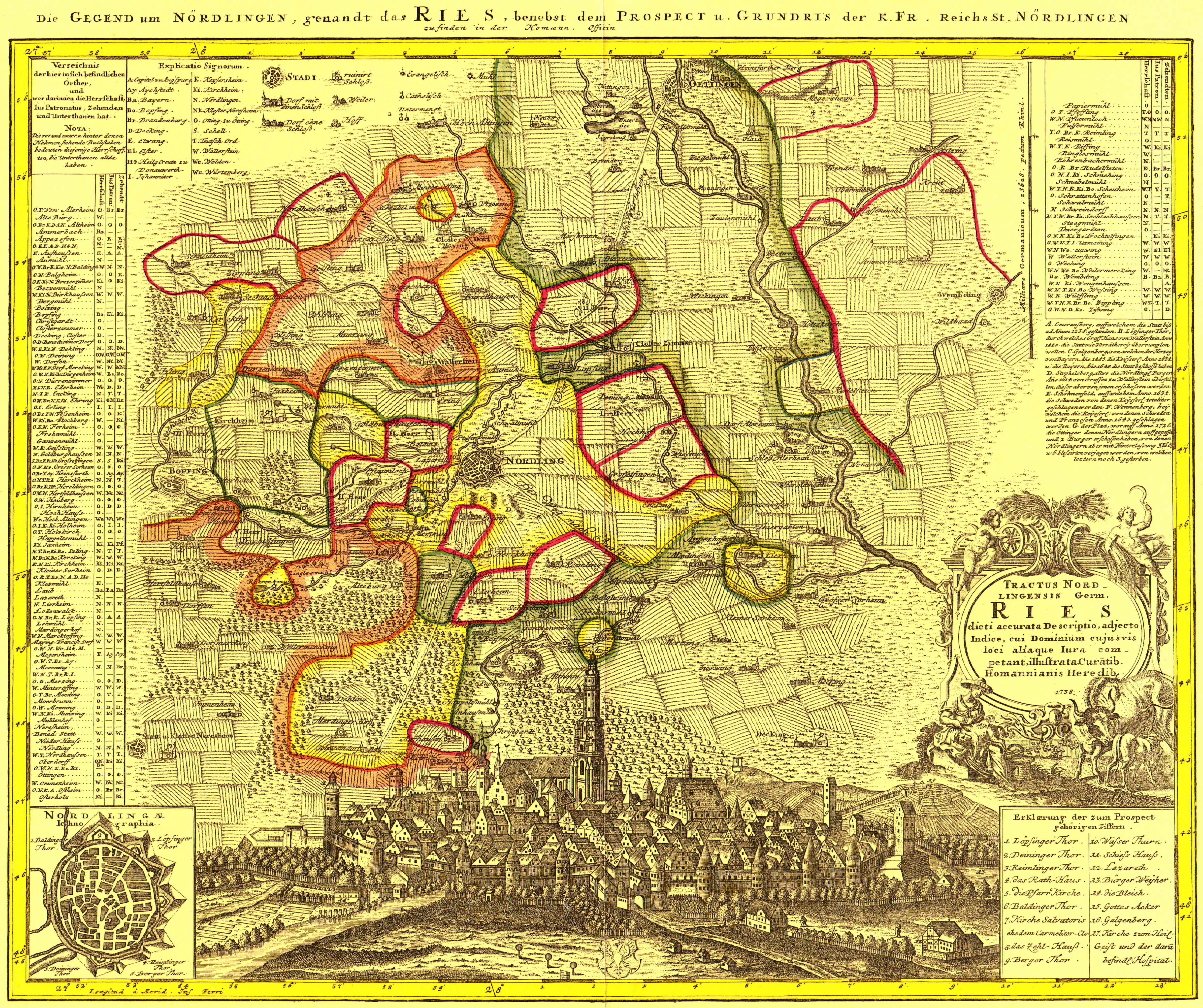 Die Gegend um Nördlingen, genandt das Ries, benebst dem Prospect u. Grundris der k.Fr. Reichs St. Nördlingen